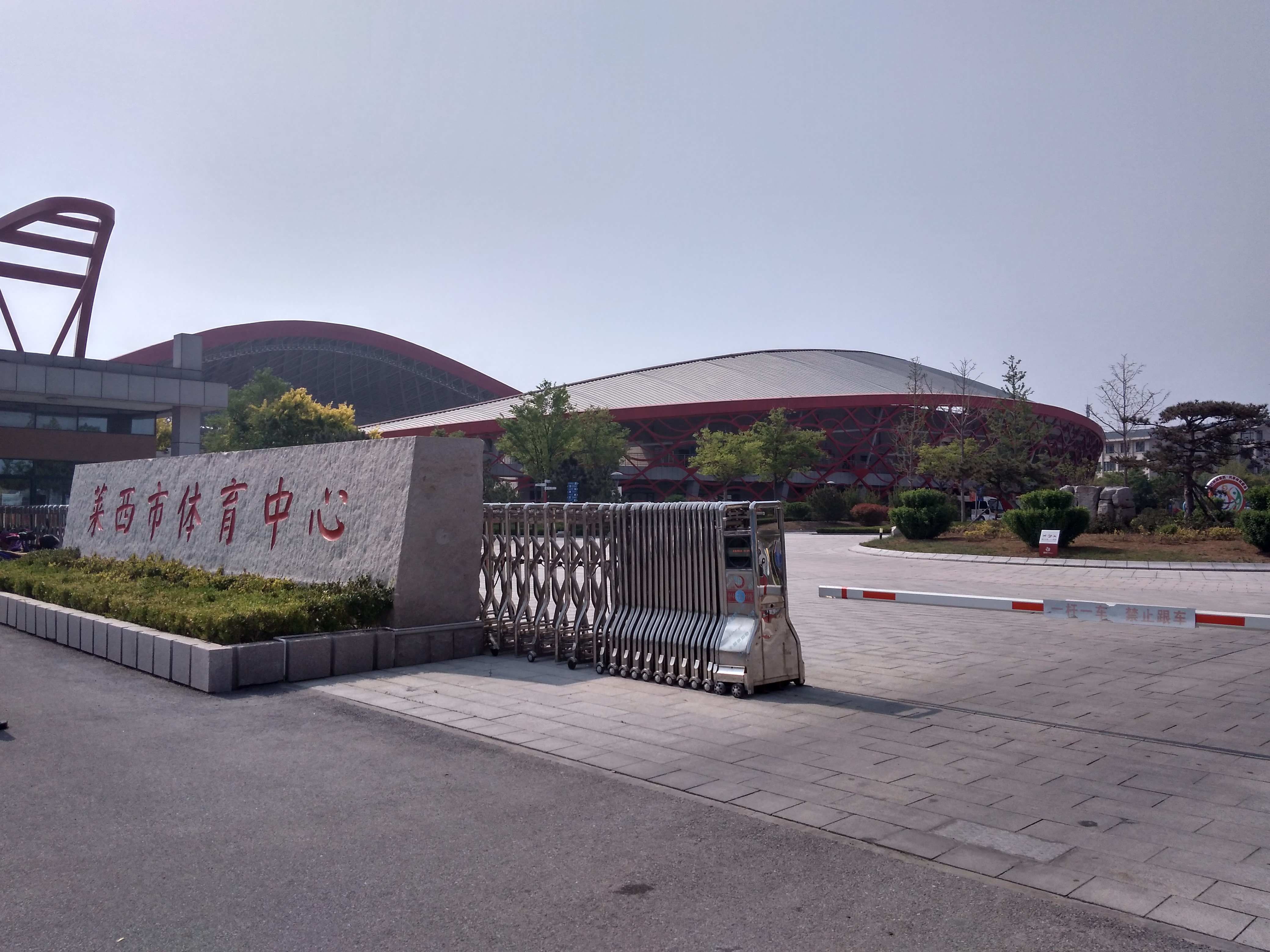 莱西市体育中心体育场